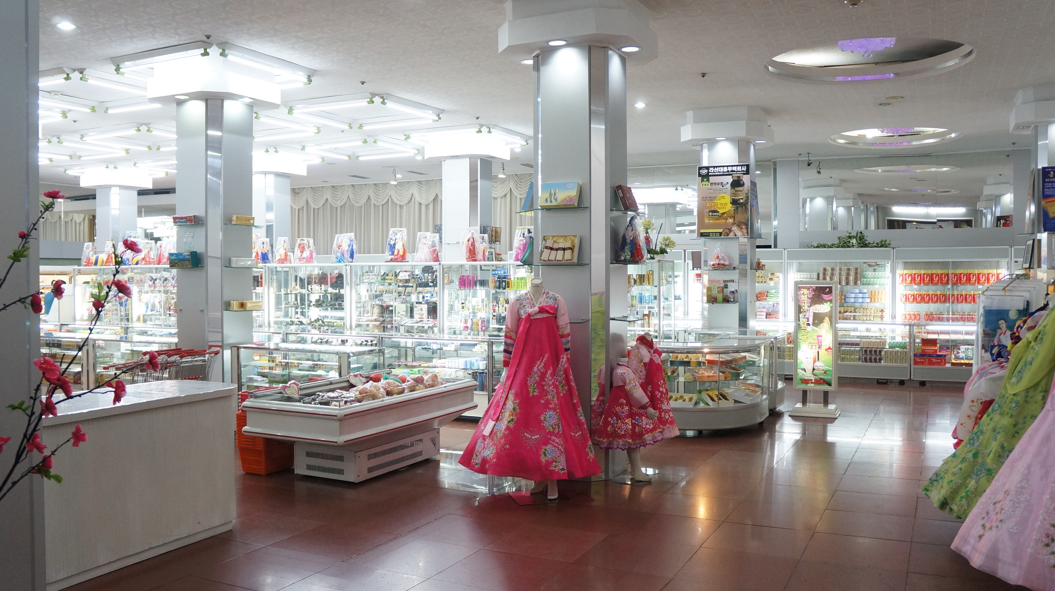 Pyongyang, North Korea DPRK